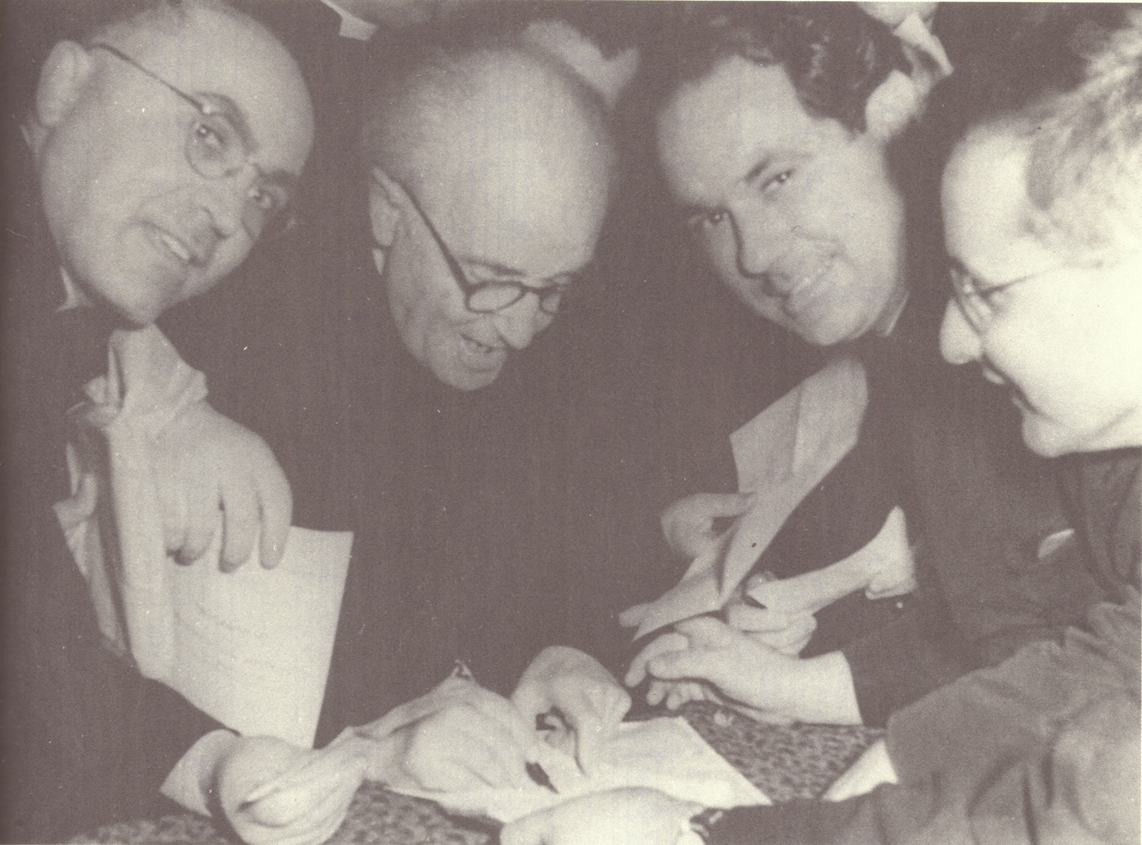 Dino Menichetti con Lorenzo Perosi